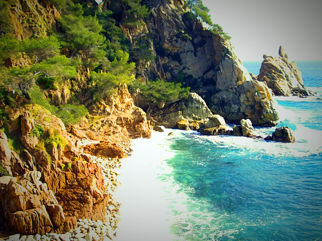 Costa Brava: Cala i Punta de s'Agulla (Blanes, provincia de Girona).